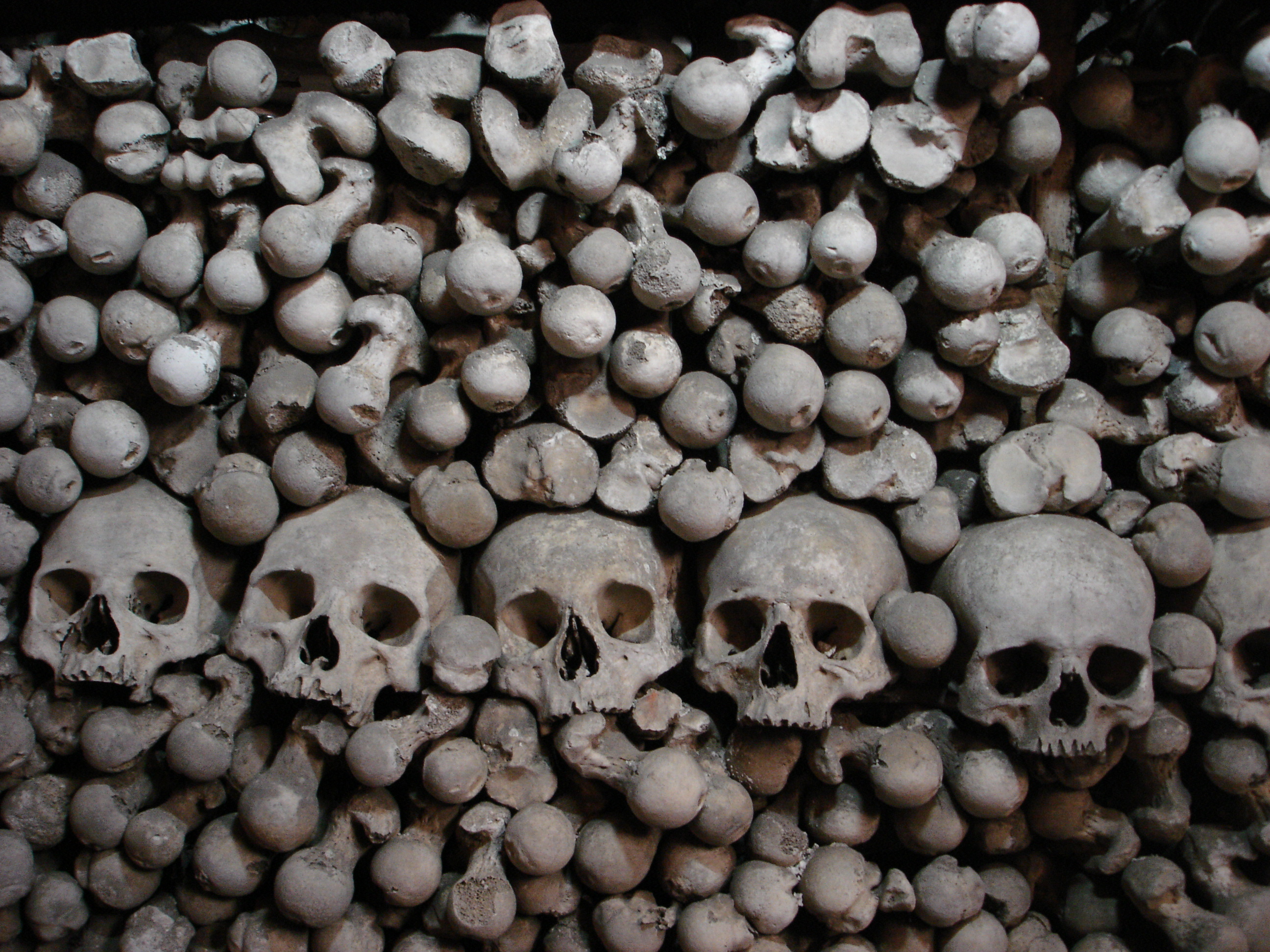 Knochenhaufen im Sedlec Ossuary